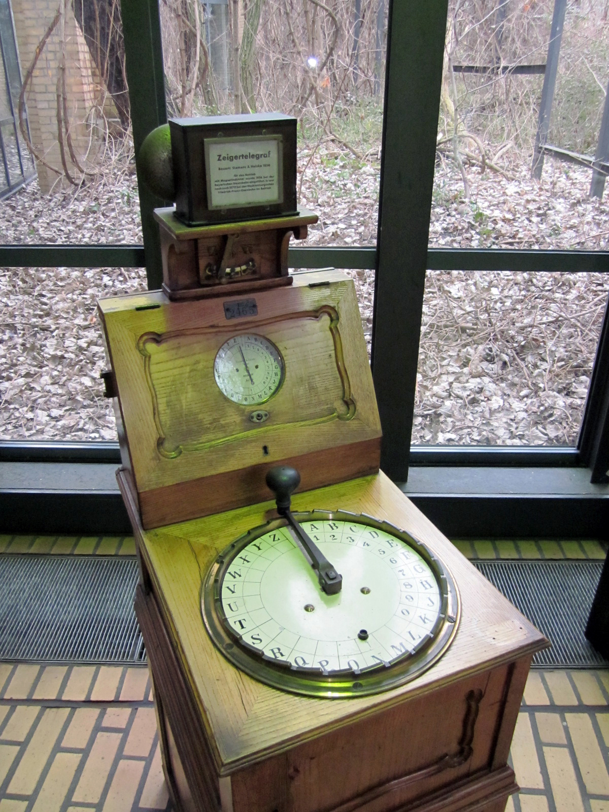 Siemens Zeigertelegraf aus dem 19. Jahrhundert